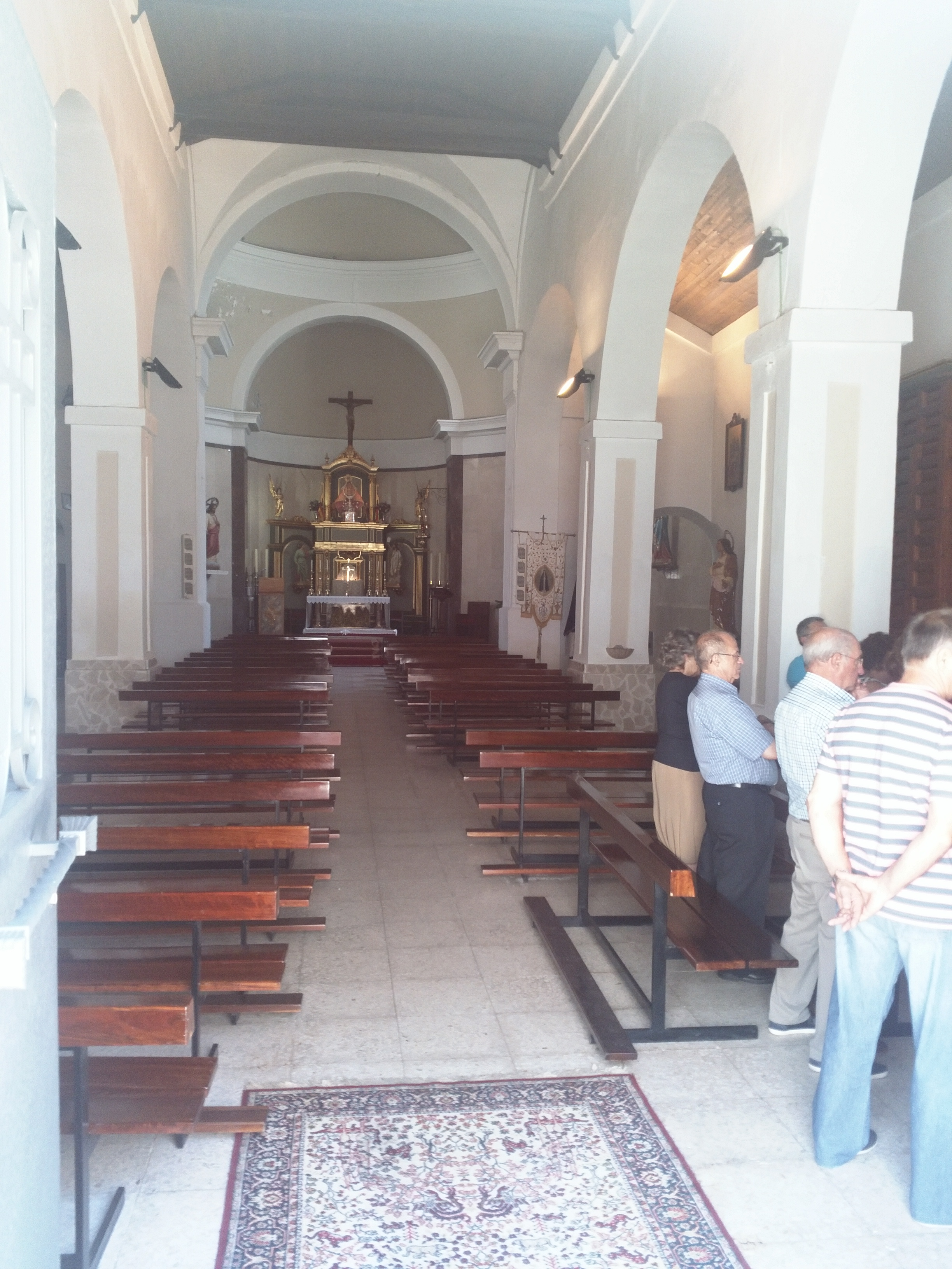 Interior de la Iglesia de San Juan Evangelista vista desde la entrada